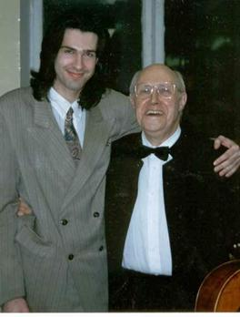 Пианист Карен Корниенко с великим маэстро Мстиславом Ростроповичем.